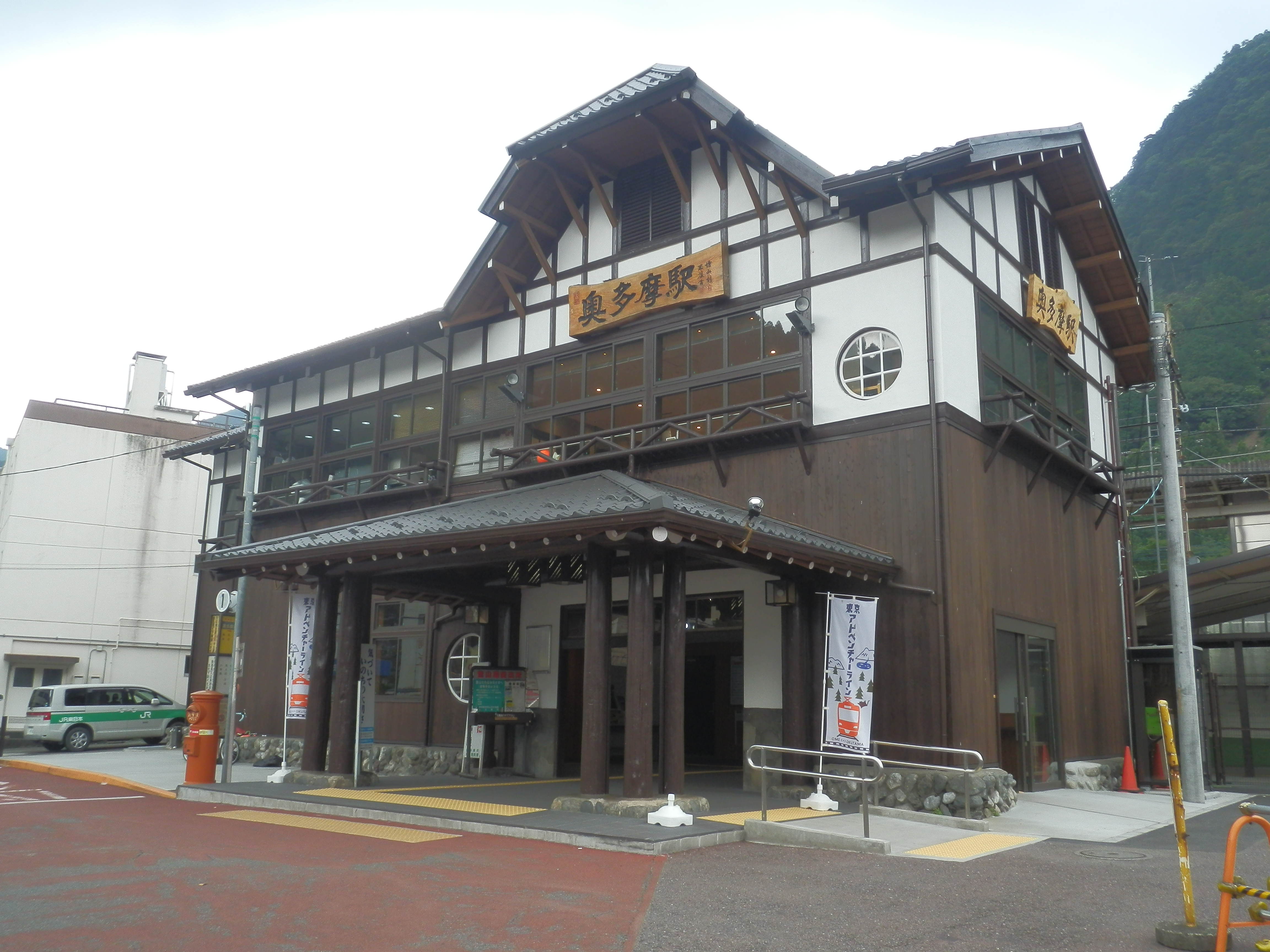 奥多摩駅駅舎（2019年）